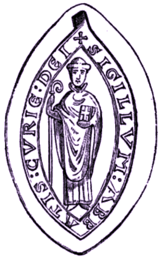 Abbaye de la Cour-Dieu, Ingrannes, Loiret, Sceau de l'abbé (gravure ancienne retouchée)